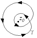 Beispiel für Windungszahl